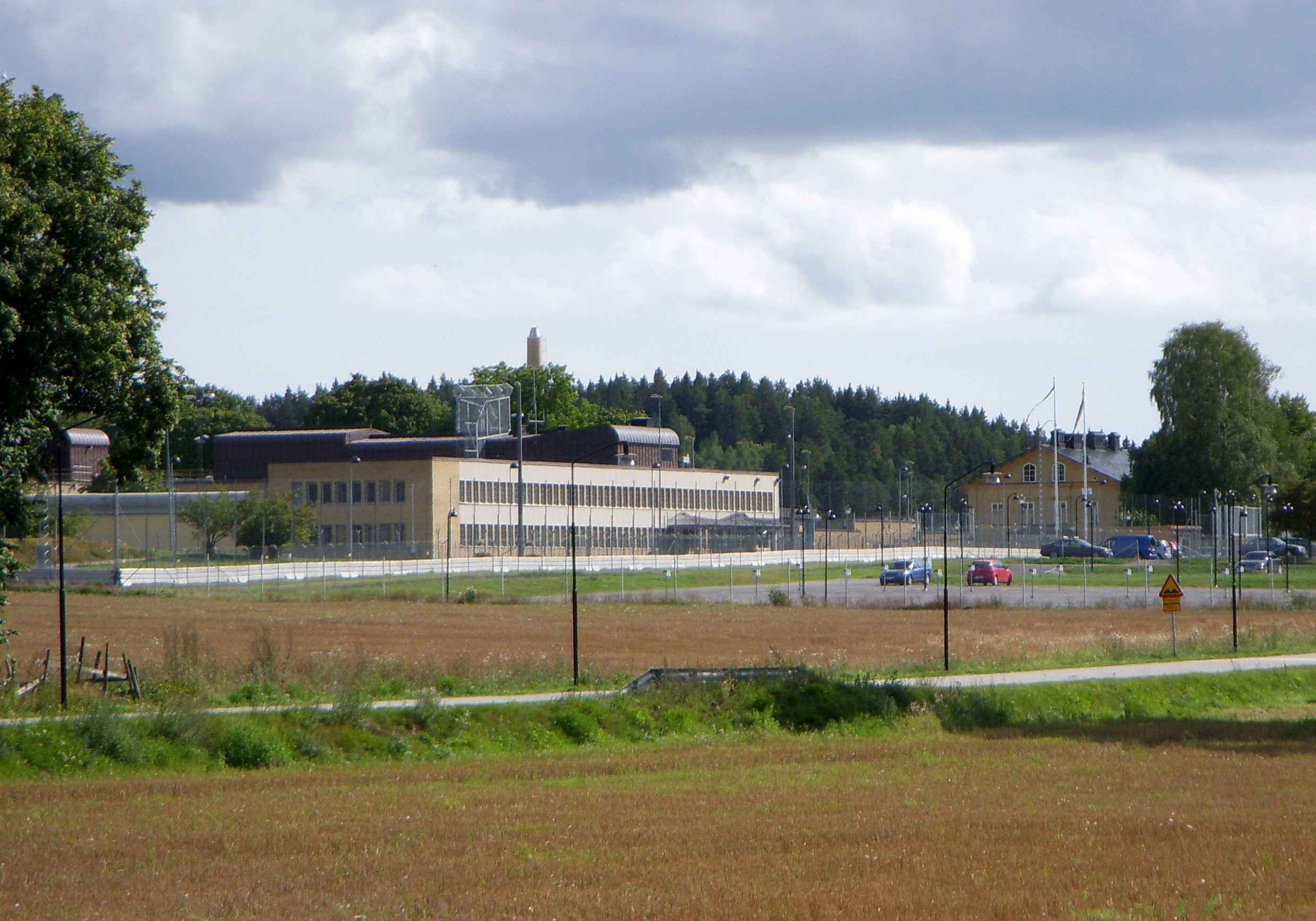 Fångvårdsanstalten "Hall", Södertälje